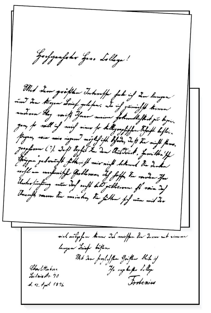 Lettre de Frobenius à Dedekind, fondatrice de la théorie des représentations des groupes